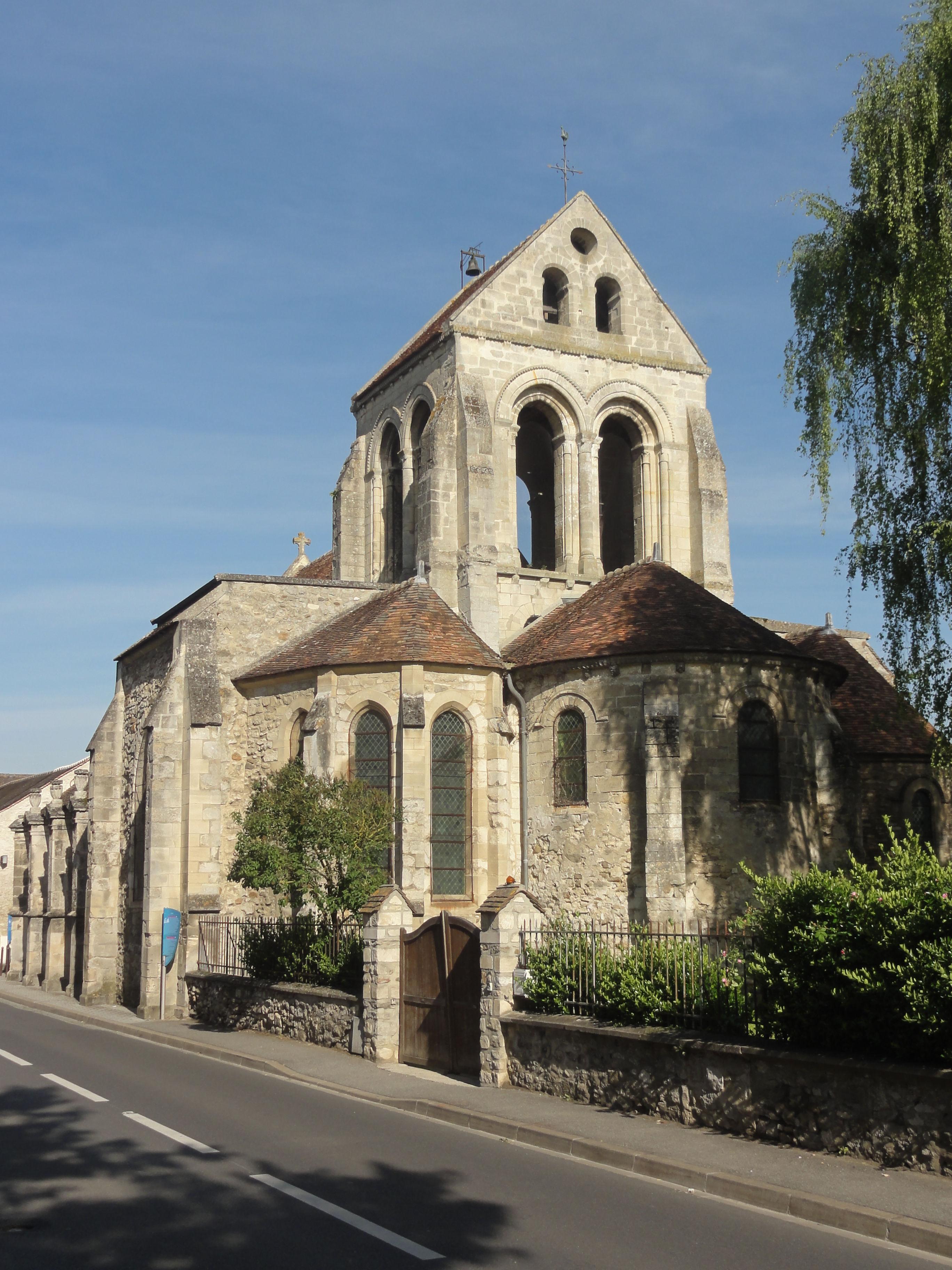 Chevet.